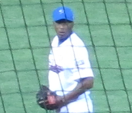 Darwin Cubillán, lanciatore della T&A San Marino. Gara1 delle Italian Baseball Series 2012, ovvero la serie finale che assegna lo scudetto italiano.